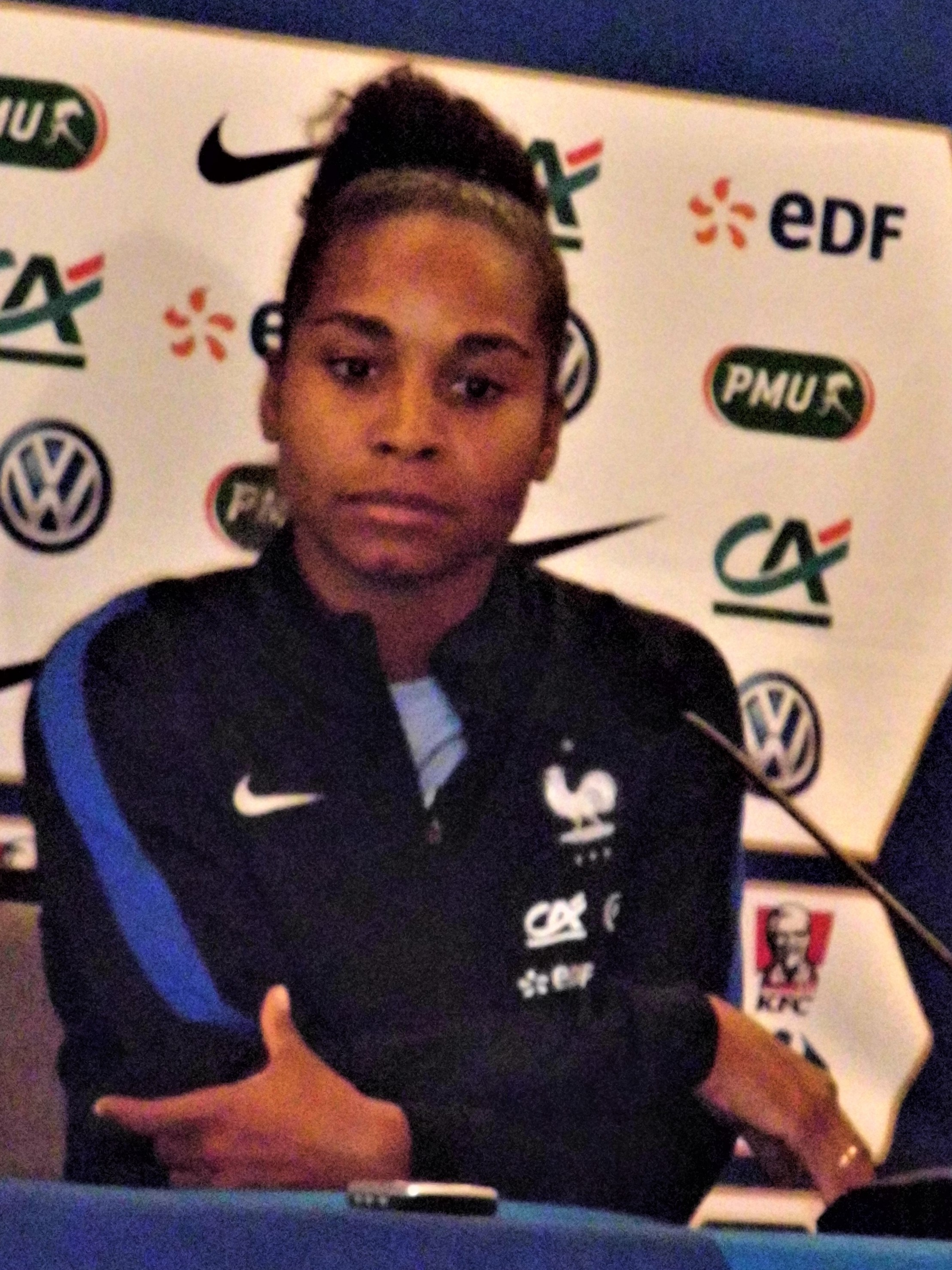 Laura Georges bei der Pressekonferenz vor dem EM-Viertelfinale gegen die Engländerinnen